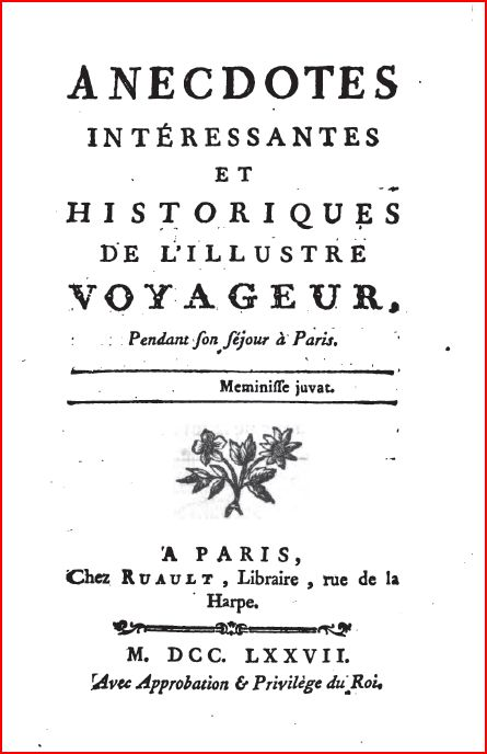 Titelseite von (Alexandre-Jacques-Louis chevalier Du Coudray:) Anecdotes intéressantes et historiques de l’Illustre Voyageur, pendant son séjour à Paris, Paris 1777.